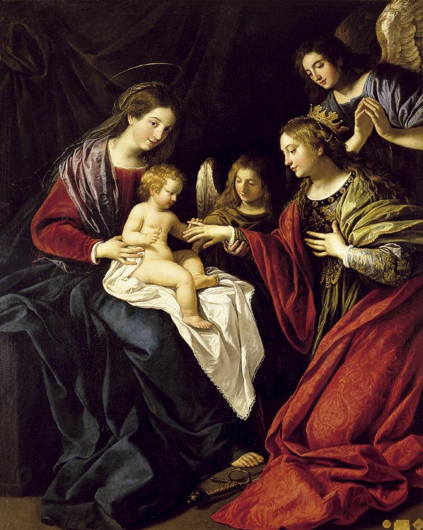 La obra representa los desposorios místicos de Santa Catalina de Alejandría.